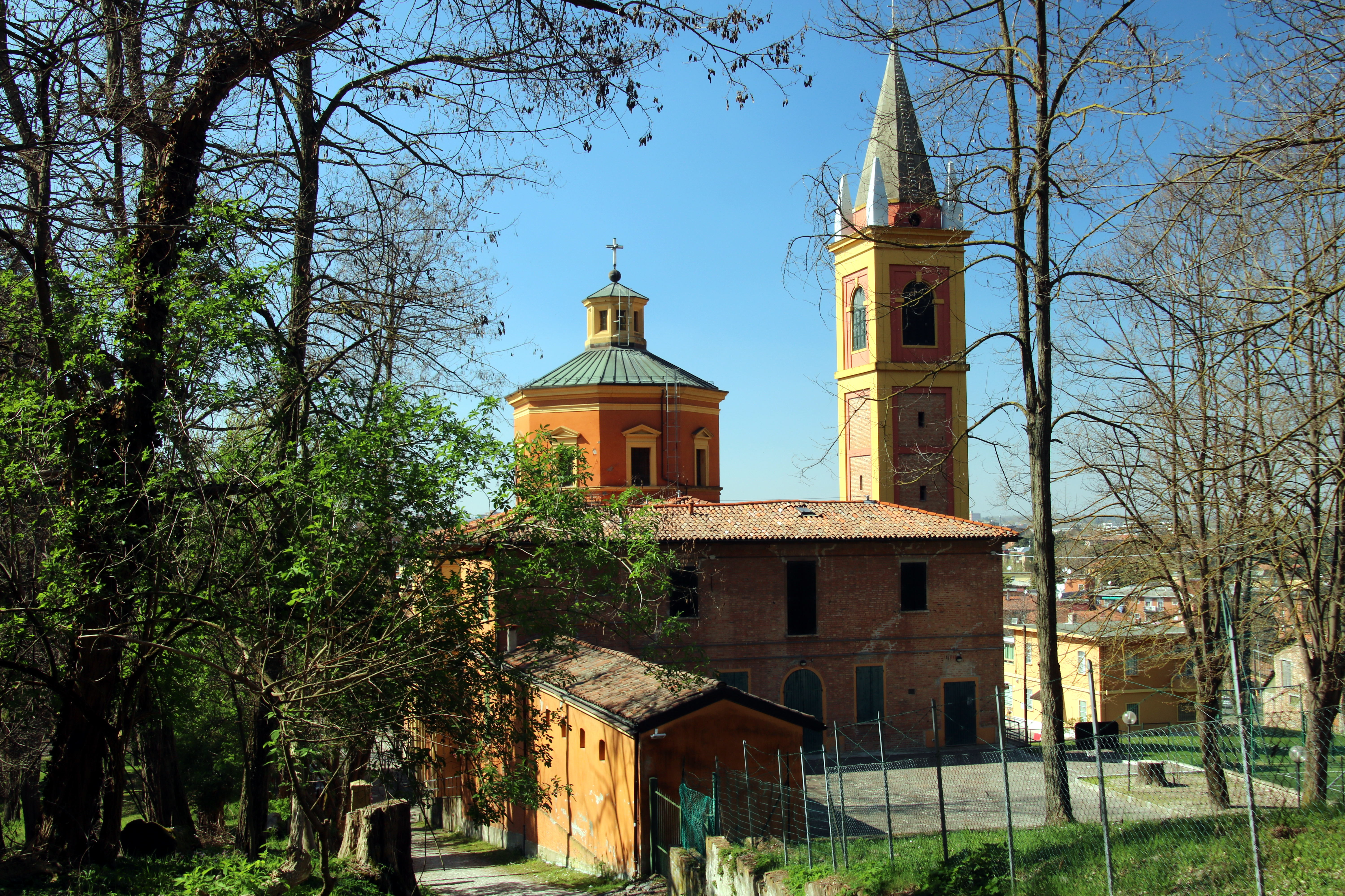 Via degli Dei, Casalecchio di Reno, Chiesa di San Martino